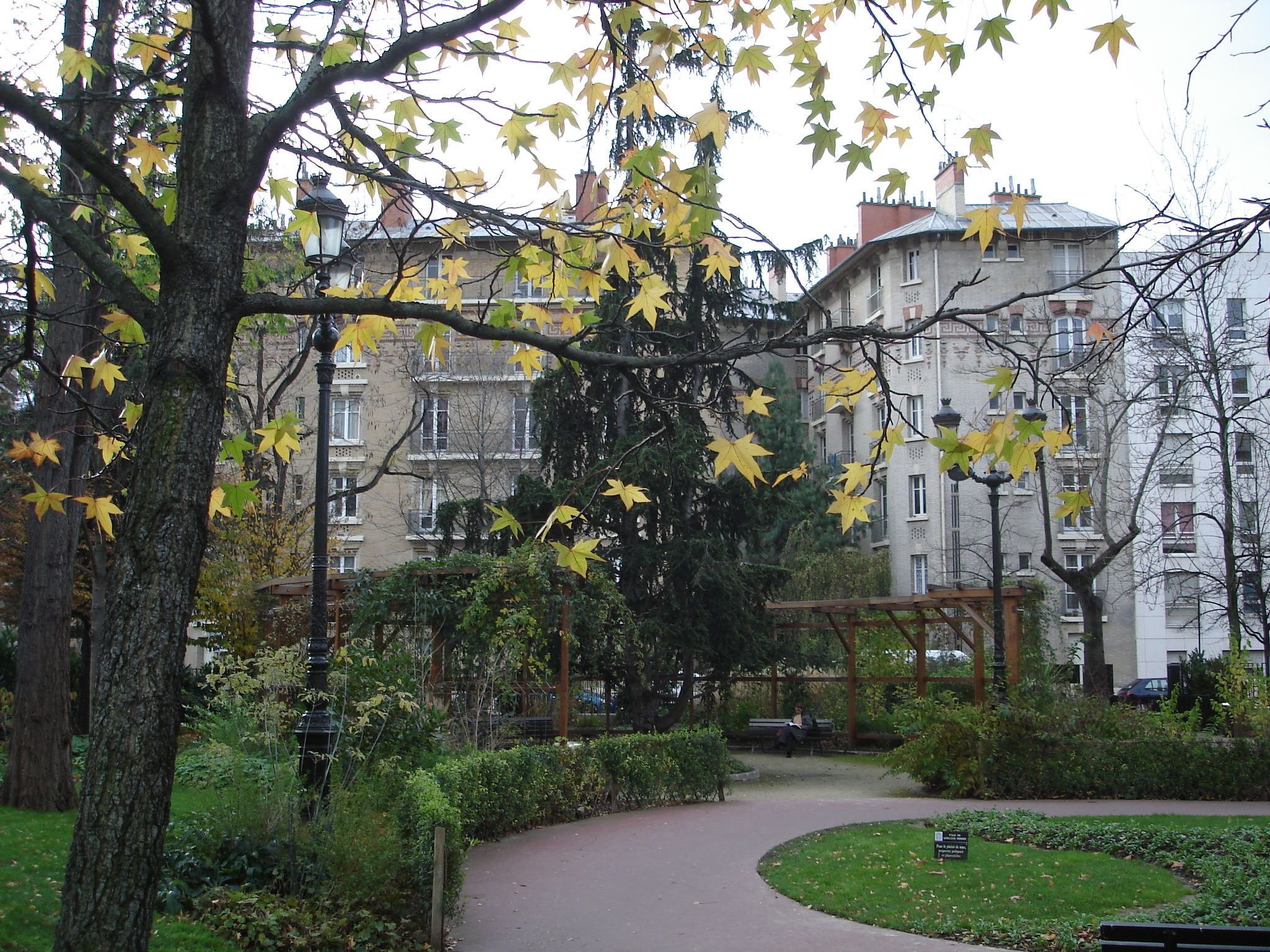 Small public garden, rue Baudin at Levallois-Perret